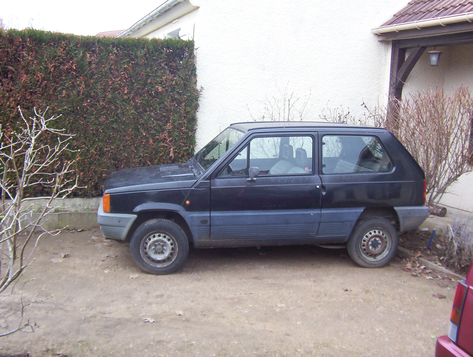 Fiat Panda 45CL coté